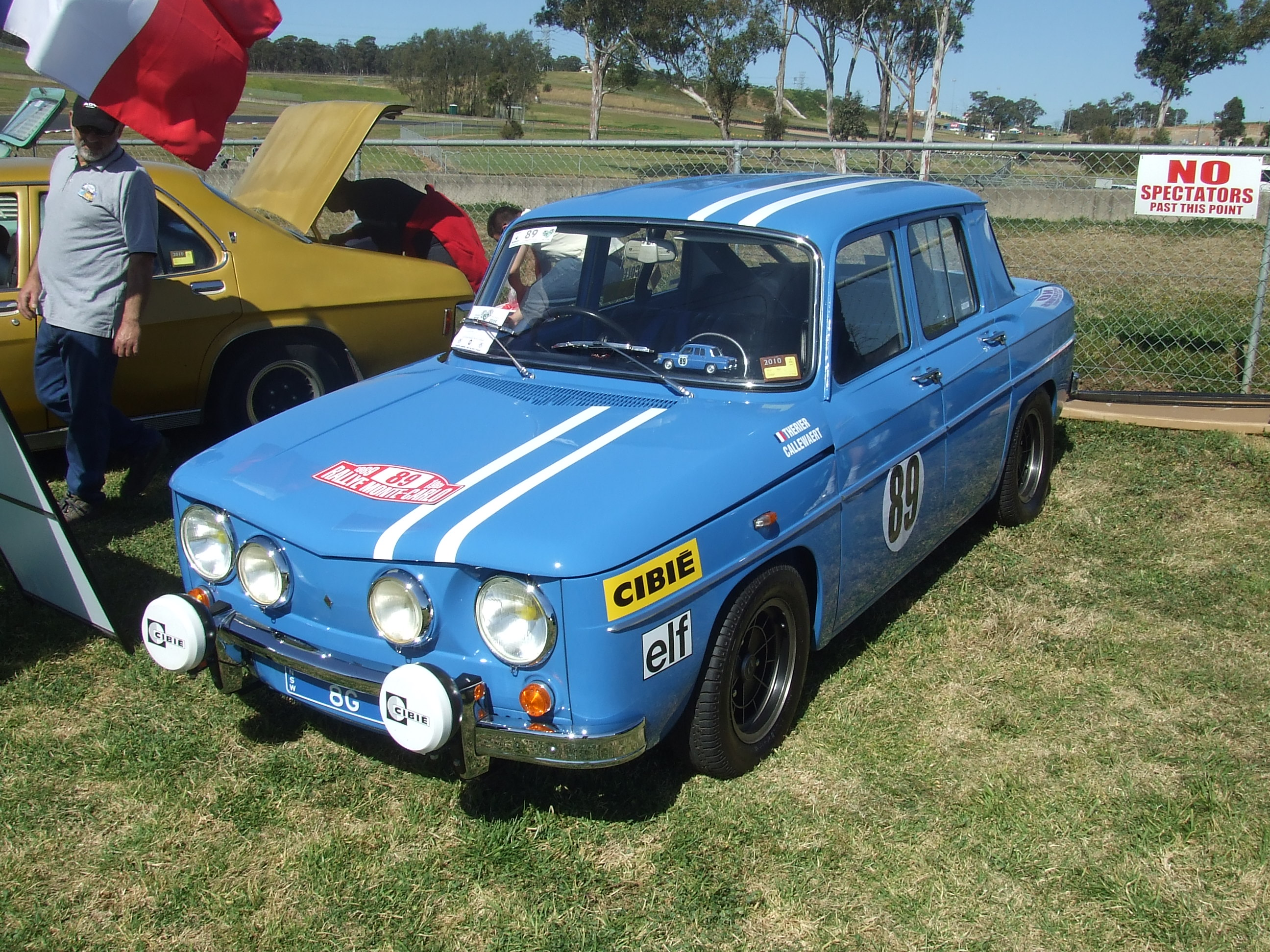 Renault R8 Gordini